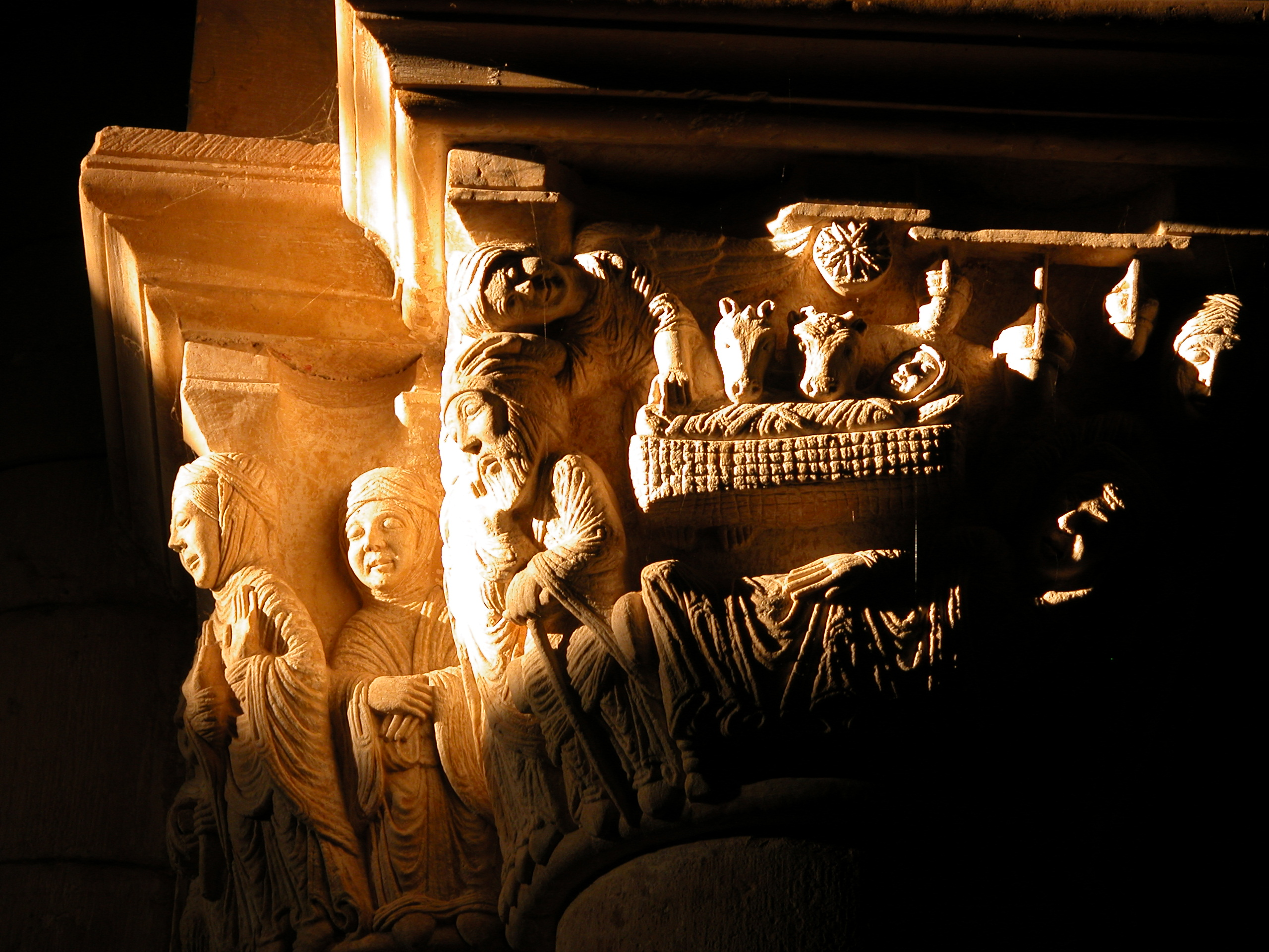 El Milagro de la luz (rayo de sol sobre el capitel románico del ciclo de la Natividad que incide directamente todos los equinoccios de primavera y otoño)